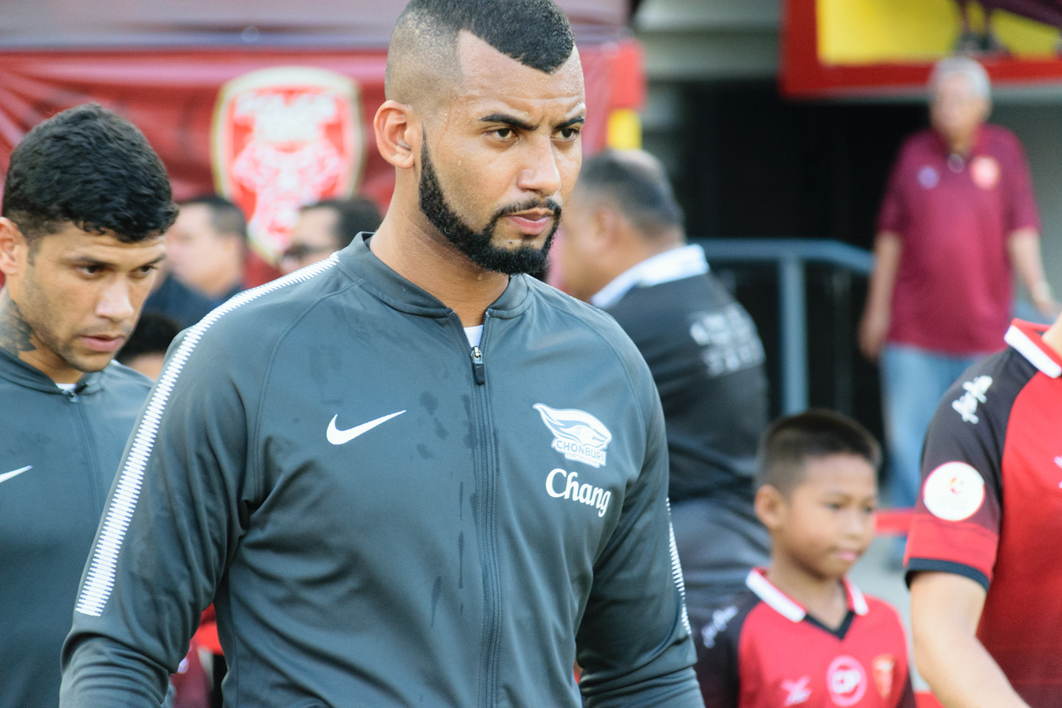 Marclei Santos